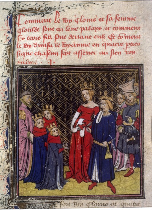 Clovis Ier et sa famille. Grandes Chroniques de France, XIVème siècle. fr. 73, fol. 13v.